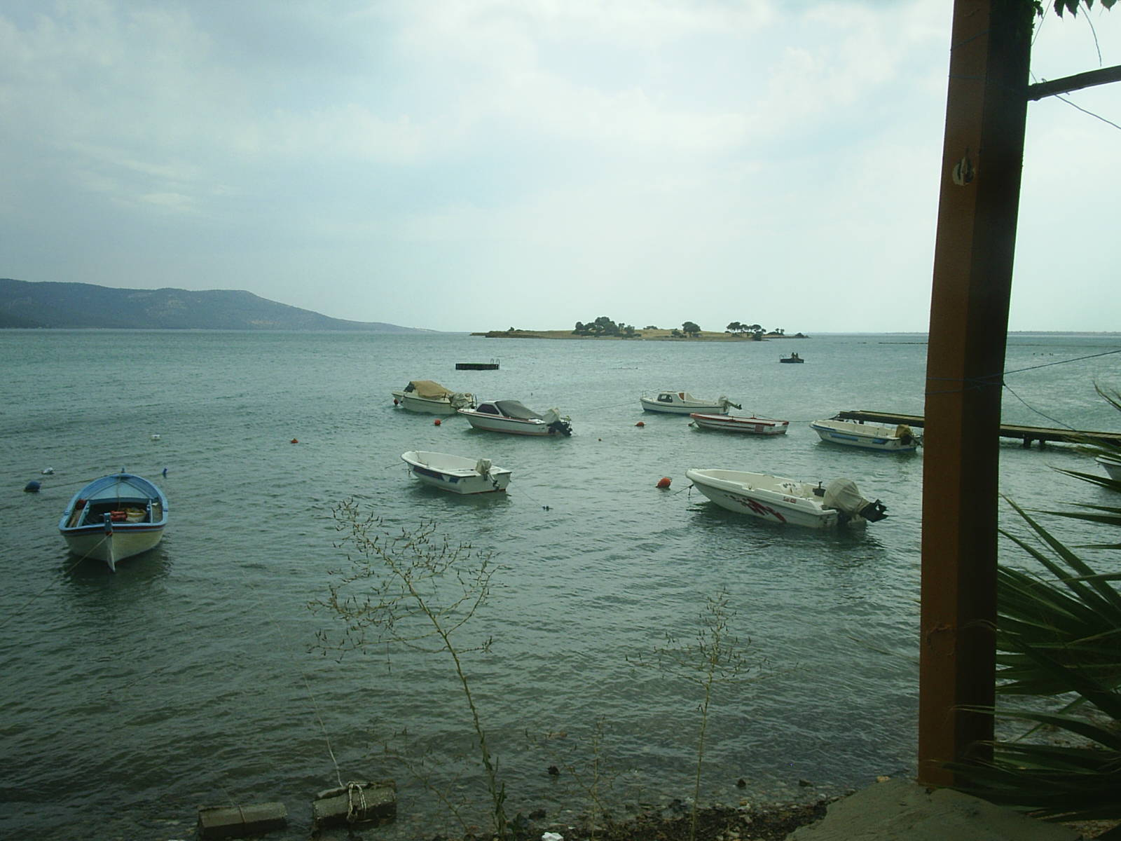 Bafa Lake, Turkey